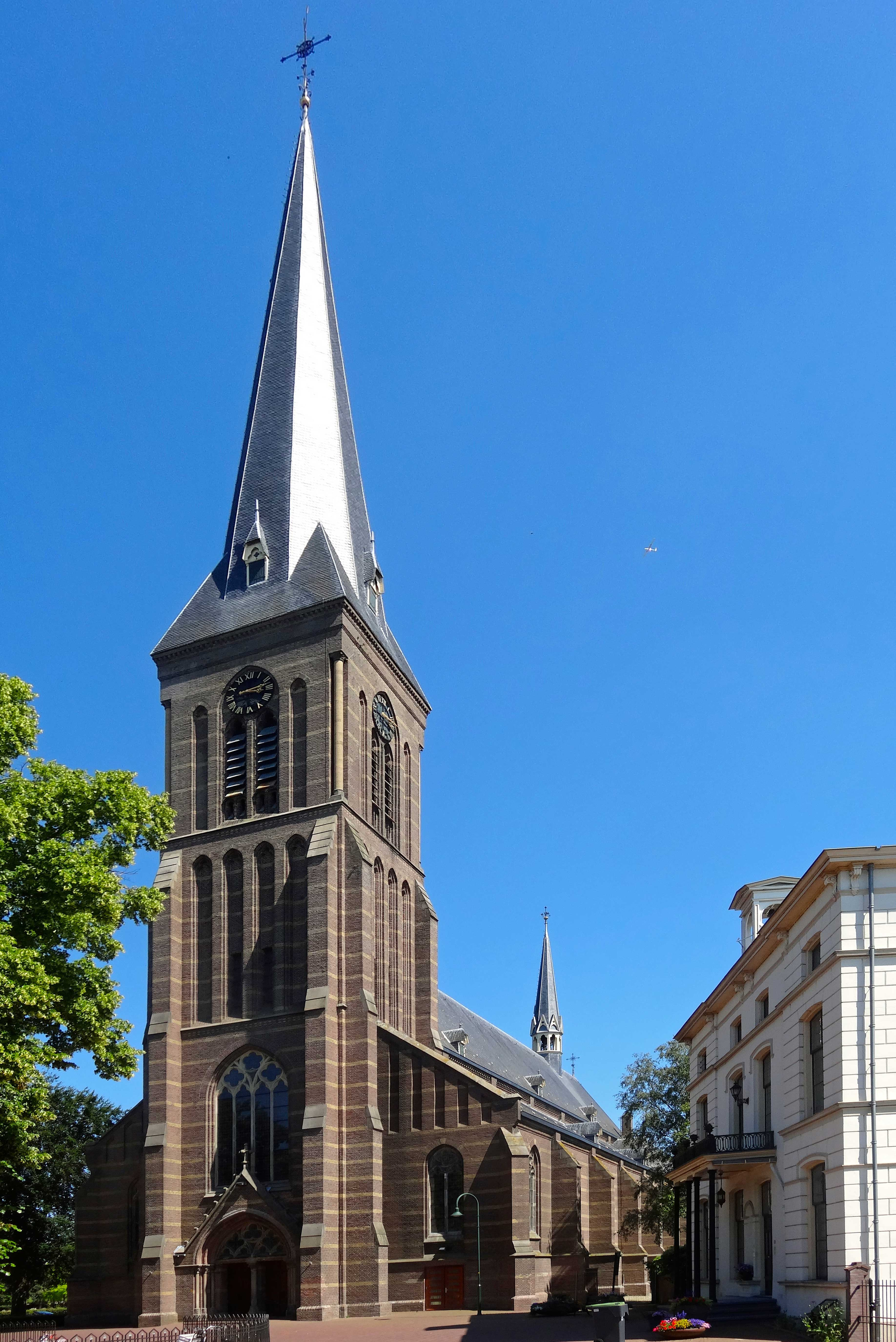 Sint Martinuskerk in Twello